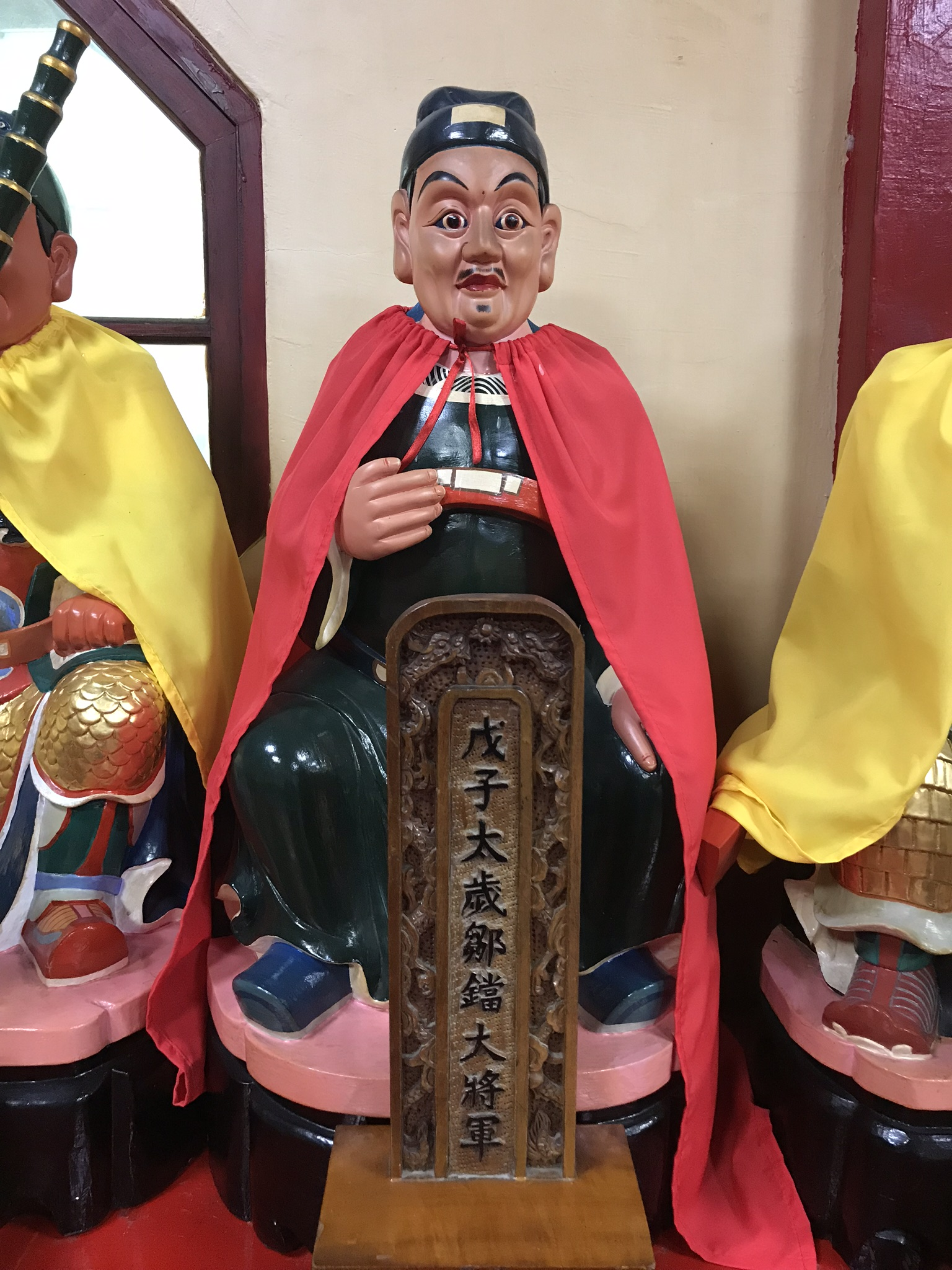 戊子太歲鄒鐺大將軍神像